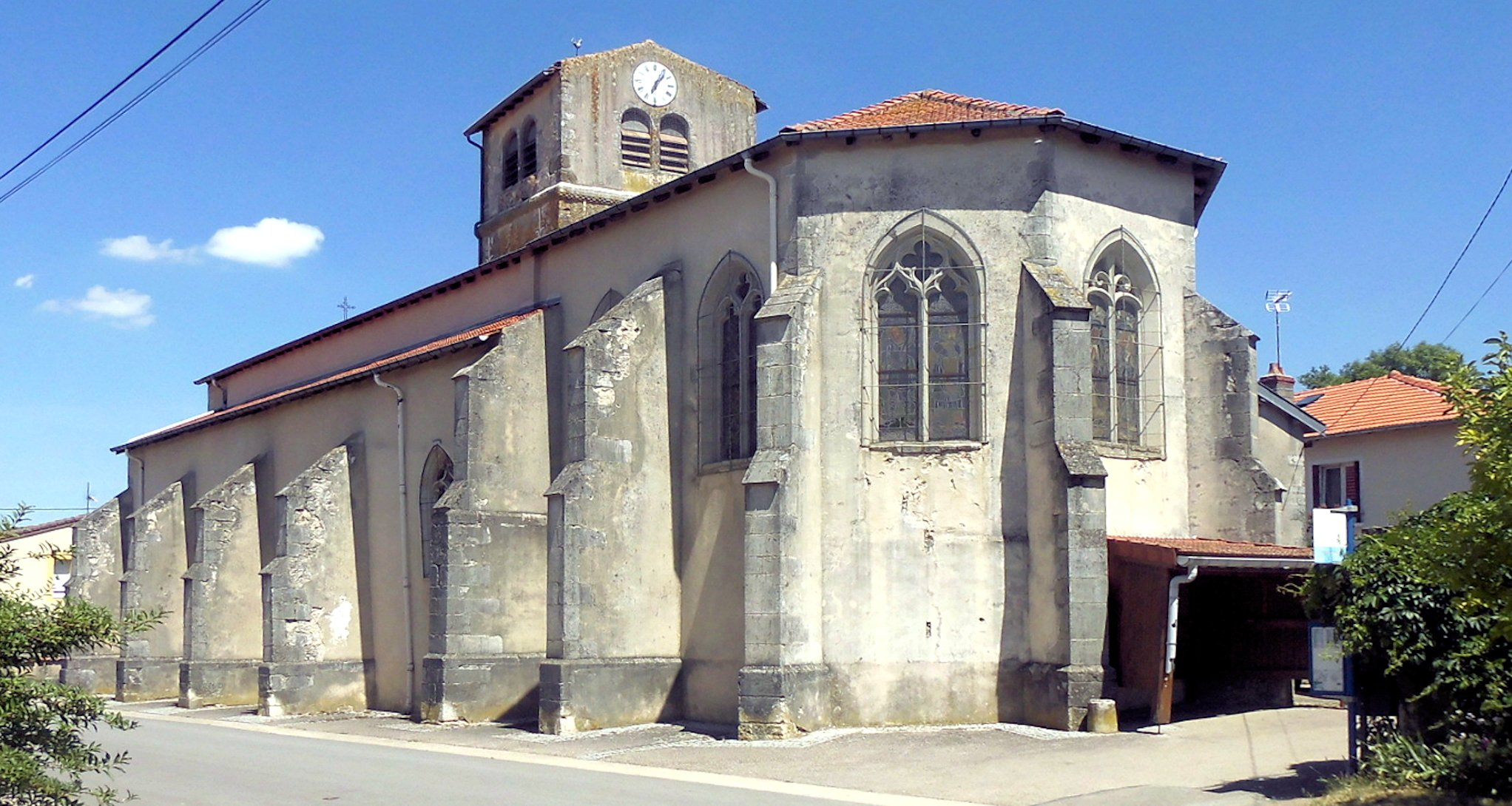 L'église Saint-Remy d'Ormes-et-Ville